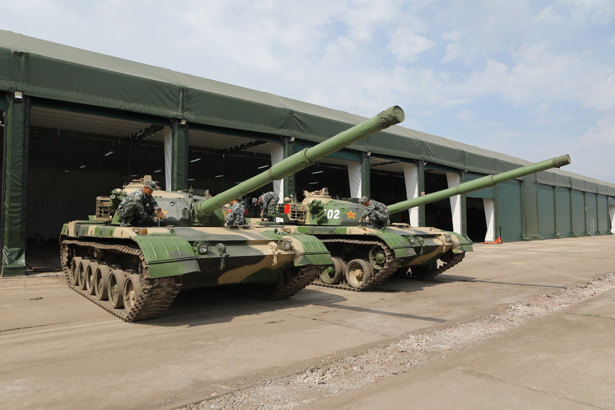 Финальный этап подготовки к международному конкурсу «Рембат-2017» (г. Омск)